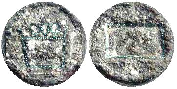 Calderilla coin